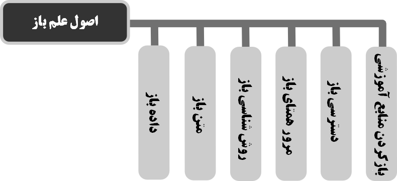 اصول علم باز